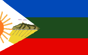 Bandera del municipio Peña, estado Yaracuy, Venezuela